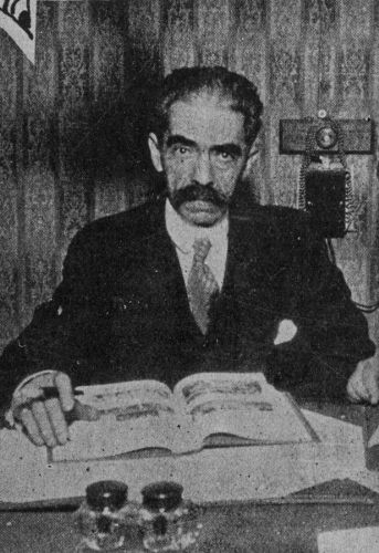 El escritor peruano Clemente Palma